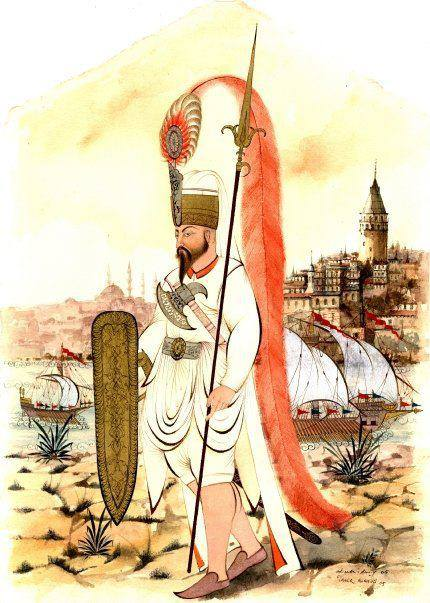 Taner Alakuş eseri - Yeni Çeri